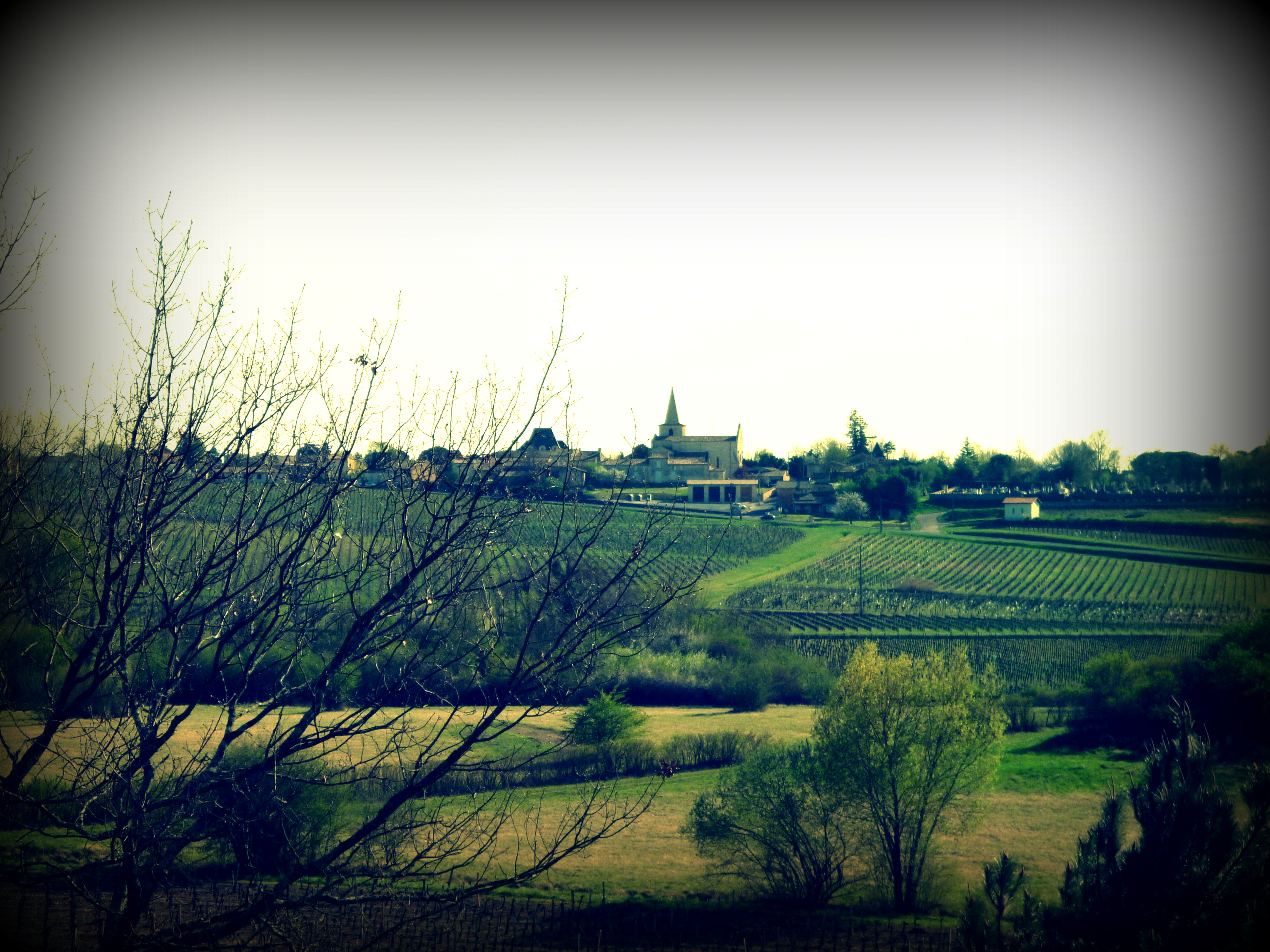 Le bourg de Berson, Gironde.